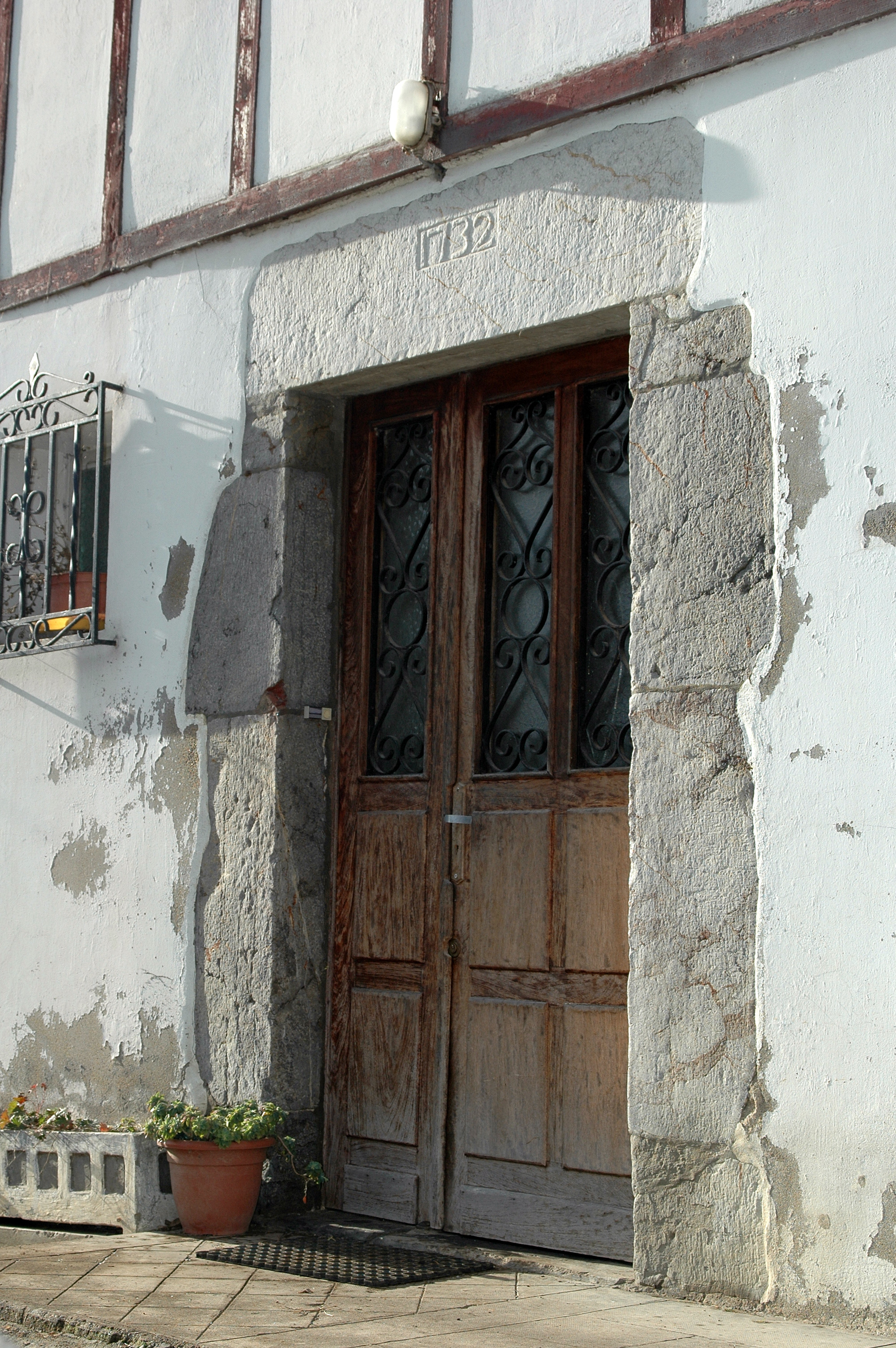 Halsou, Linteau scupté. photo prise le 31/12/06 par Harrieta171